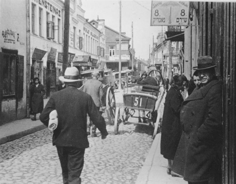 Kowno (Kaunas), Blick in die Altstadt Litauen, Kaunas, ein Blick in die alte Stadt. Ein Gewirr von schmutzigen, schlecht gepflasterten Gässchen. Jüdischer Jargon und jüdische Inschriften sind hier zu Hause. Die Häuser sind 2-stockig aus der russischen Zeit. [um 1936]